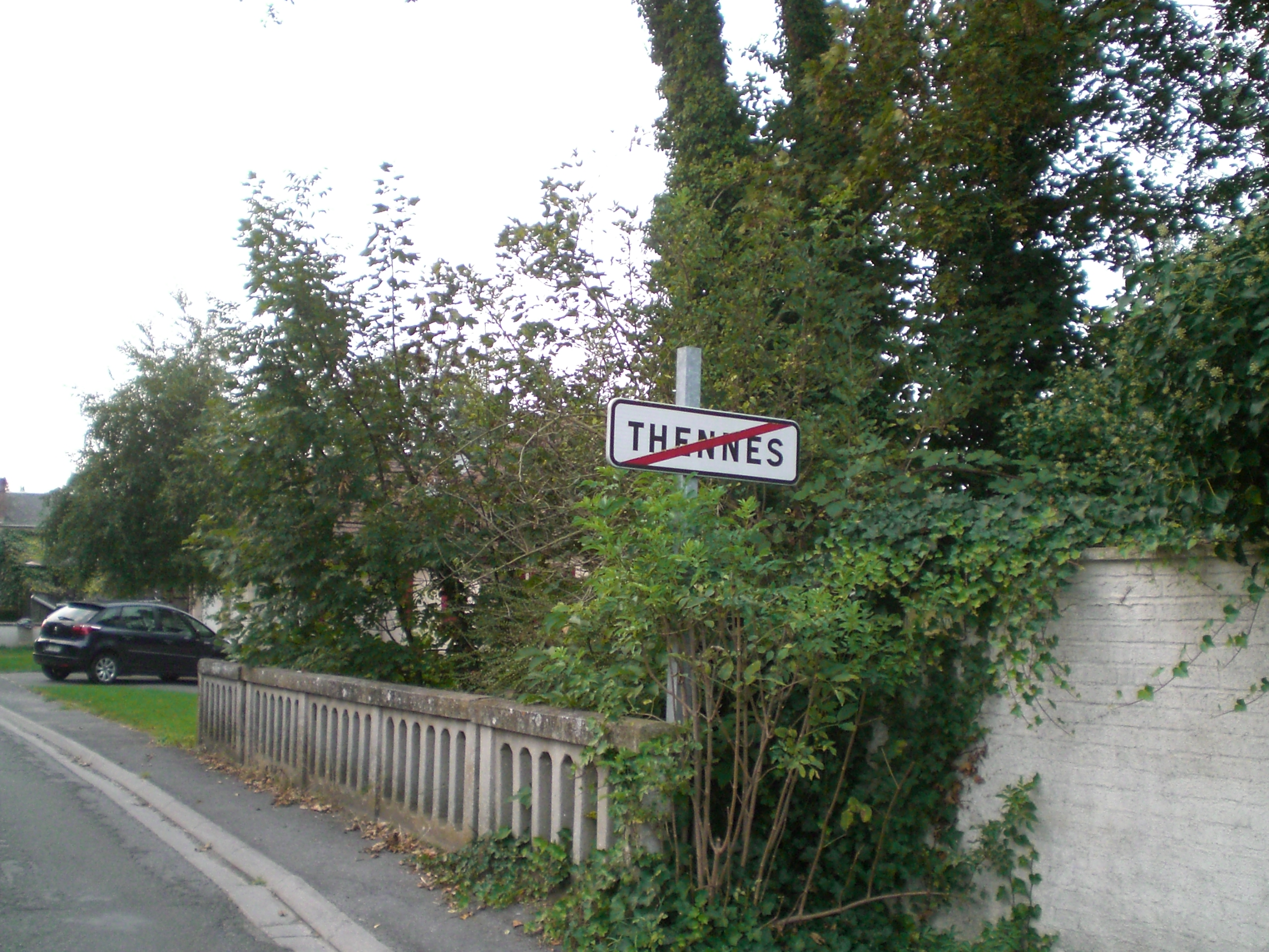 La Luce à Thennes - pont routier et panneau